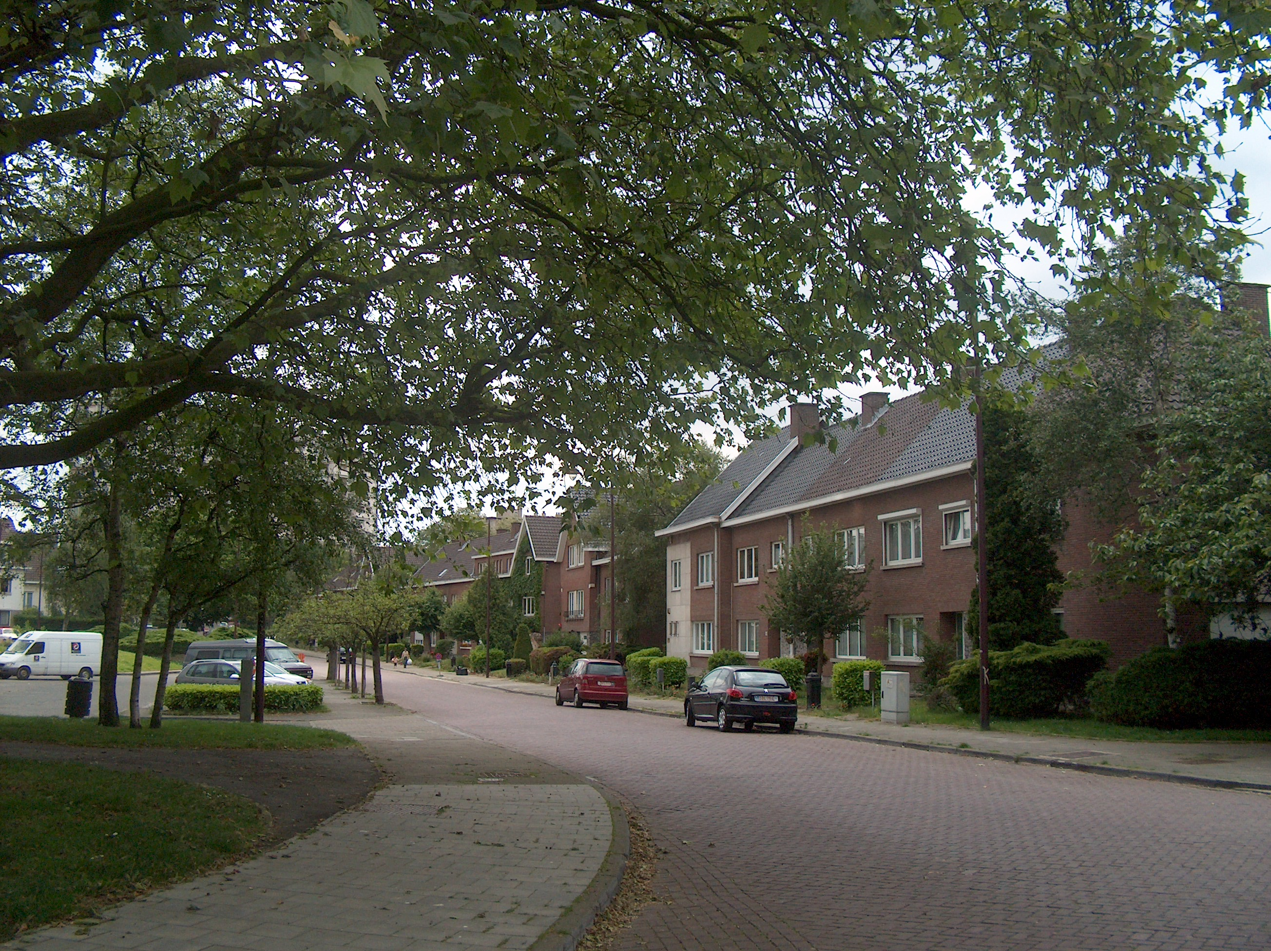 L'avenue des Jardins à Schaerbeek, Bruxelles, Belgique.